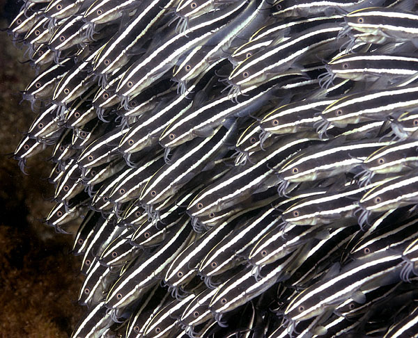 Un banc de poissons-chats rayés (Plotosus lineatus) à la Réunion.